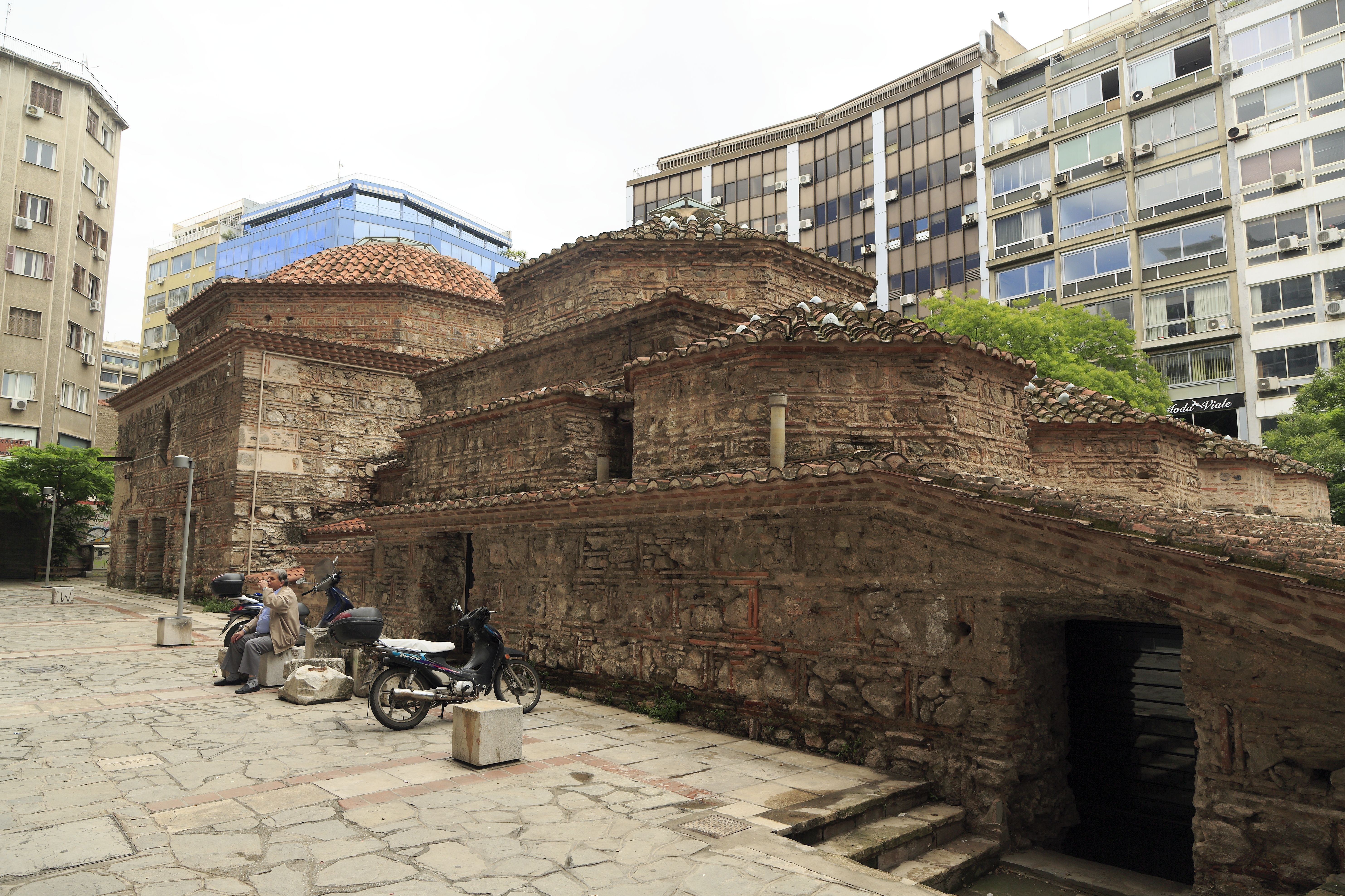 Türkisches Bad an der Odos Komninón